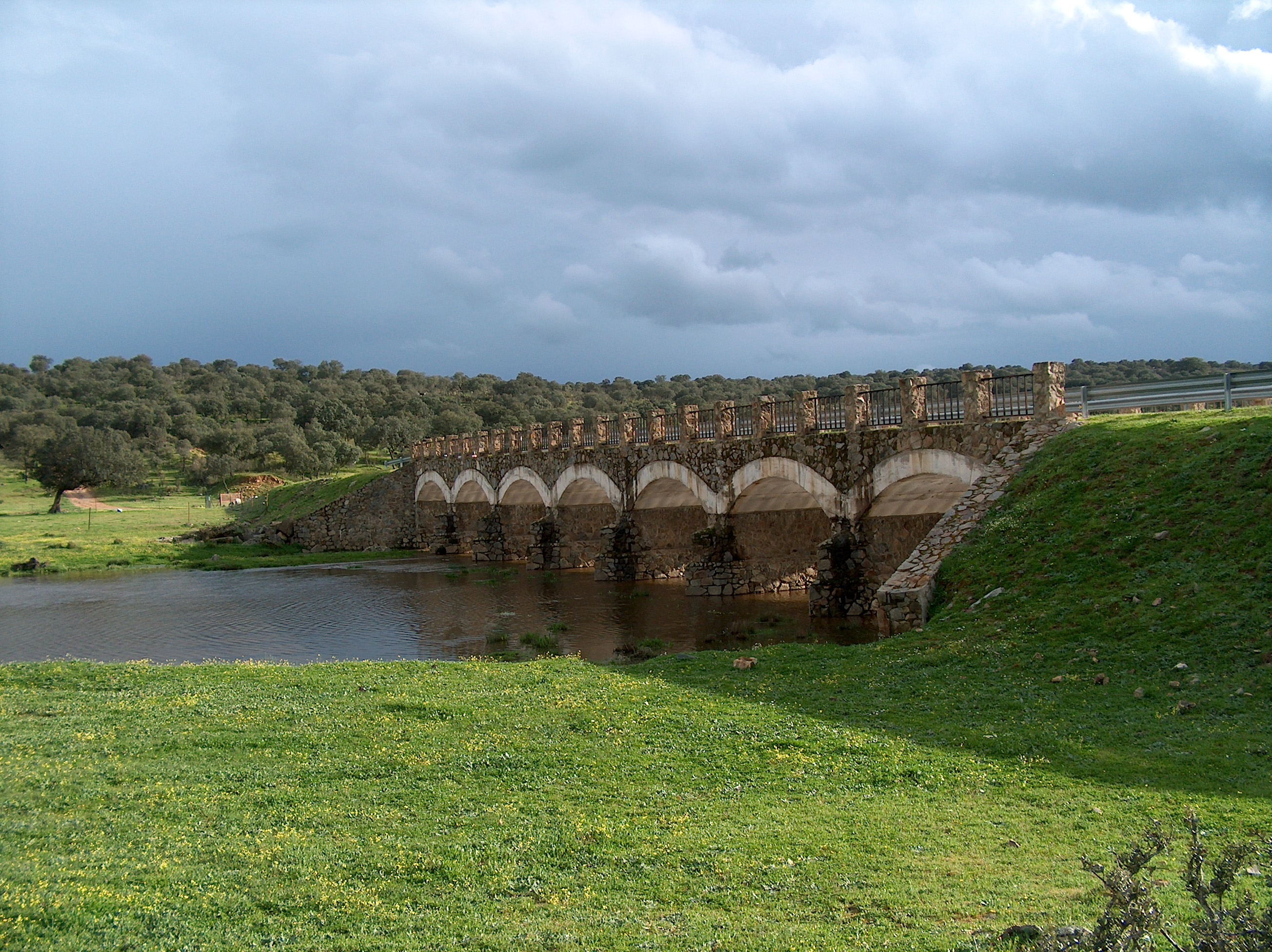 Puente denominado de "La sardina" sobre el río Salor, provincia de Cáceres, España. Se ubica en el término municipal de la capital provincial Cáceres, pero la localidad más cercana al puente es Malpartida de Cáceres. El puente forma parte de un intento fallido de construir una carretera denominada "carretera de la Sardina", que en la II República pretendió unir Malpartida de Cáceres con la carretera Cáceres-Badajoz sin necesidad de entrar en la capital.